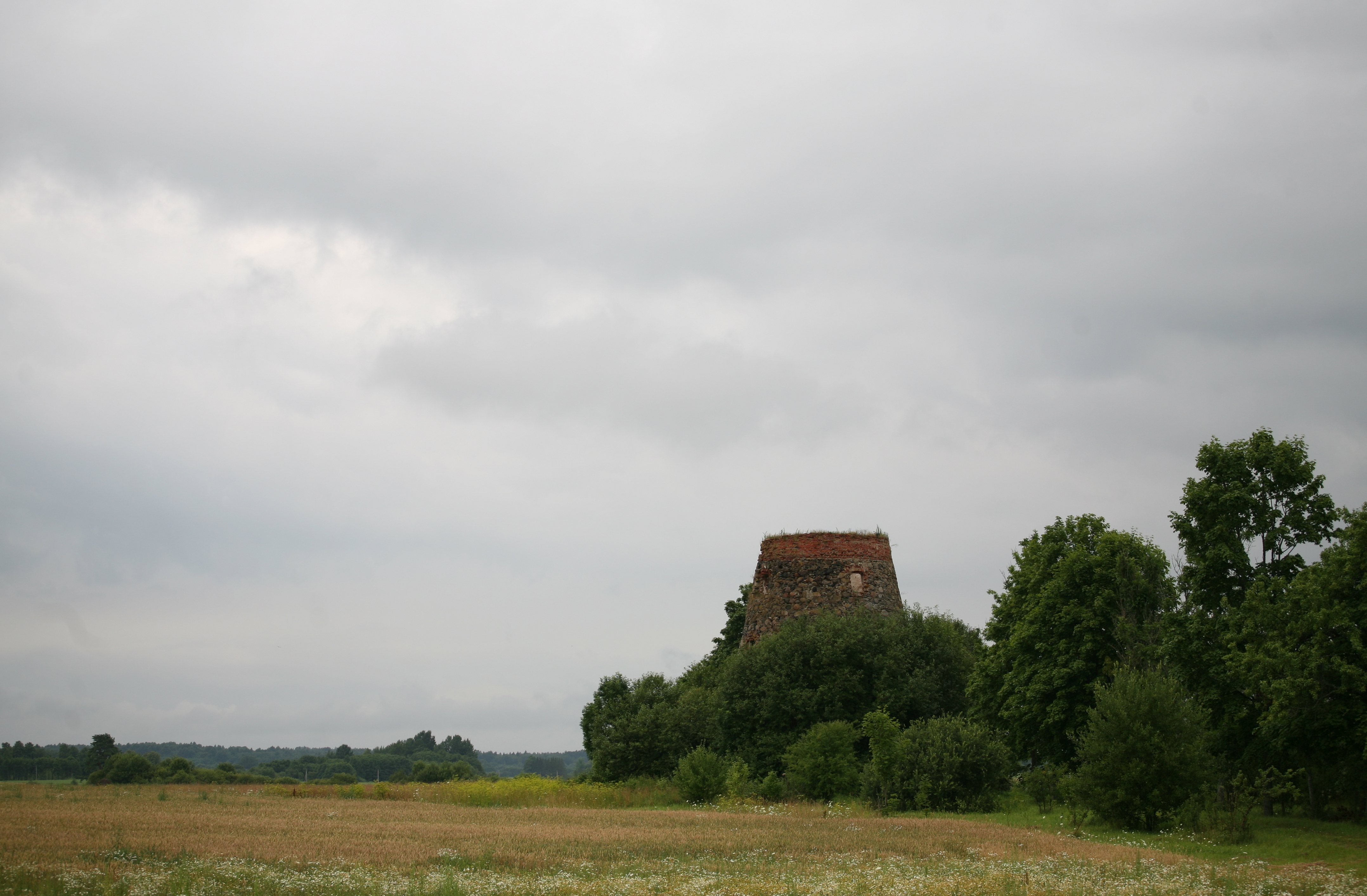 Vējdzirnavas pie Bruzilām